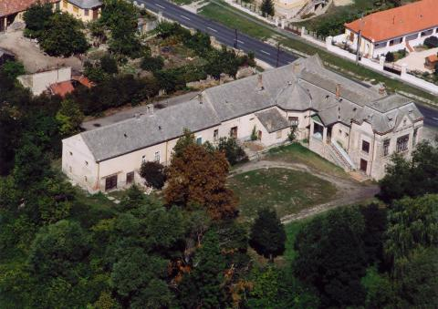 Bakonybánk, Hungary, aerial photography